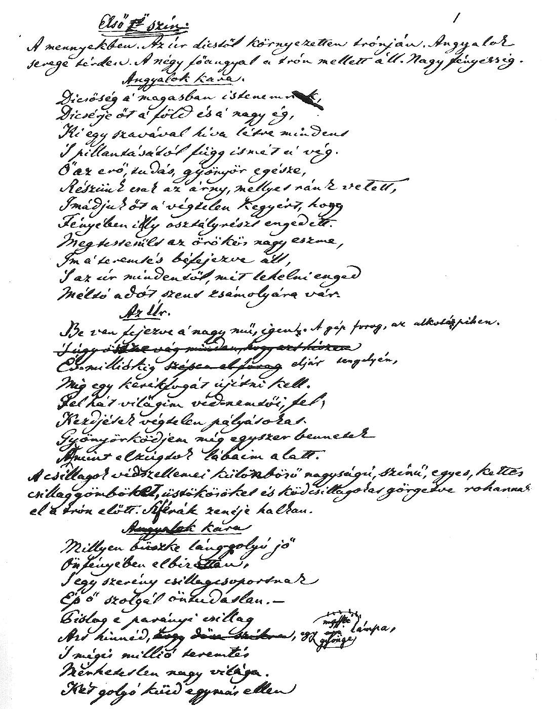 Egy lap Madách Imre: Az ember tragédiája c. művének kéziratából